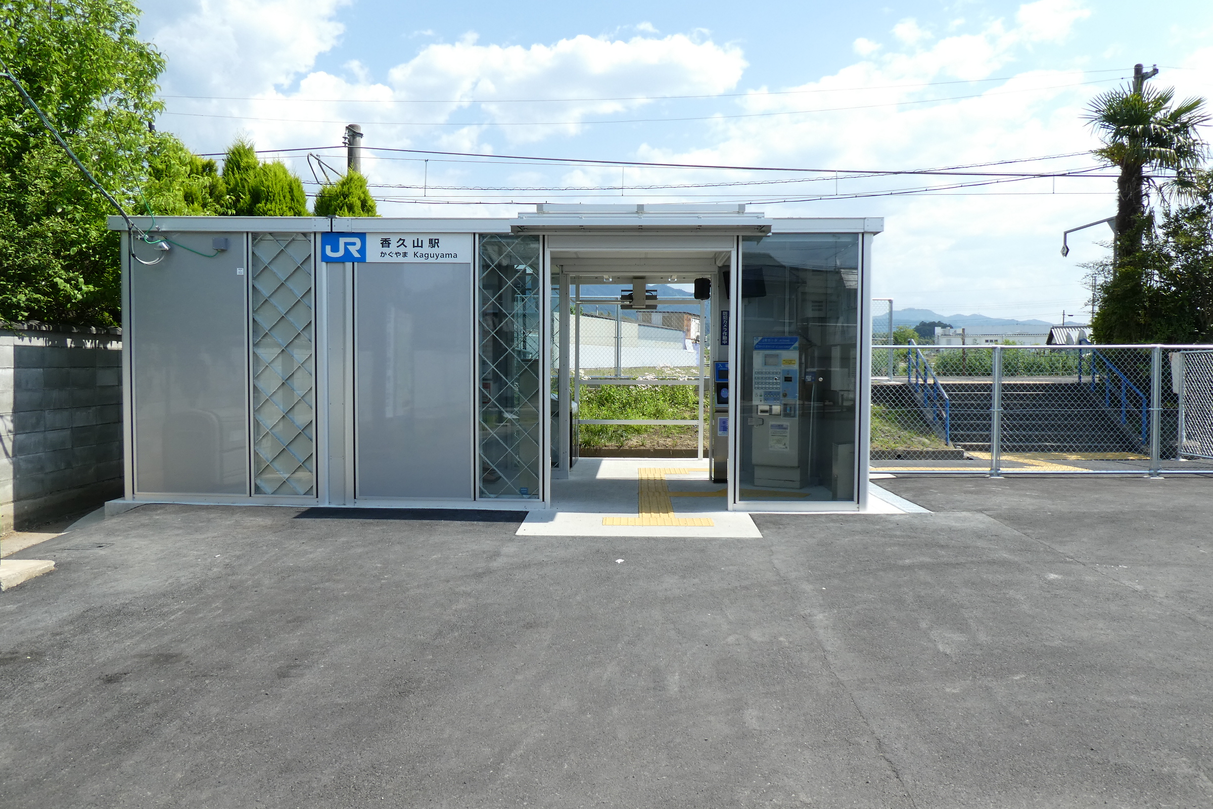 香久山駅 2019年5月5日